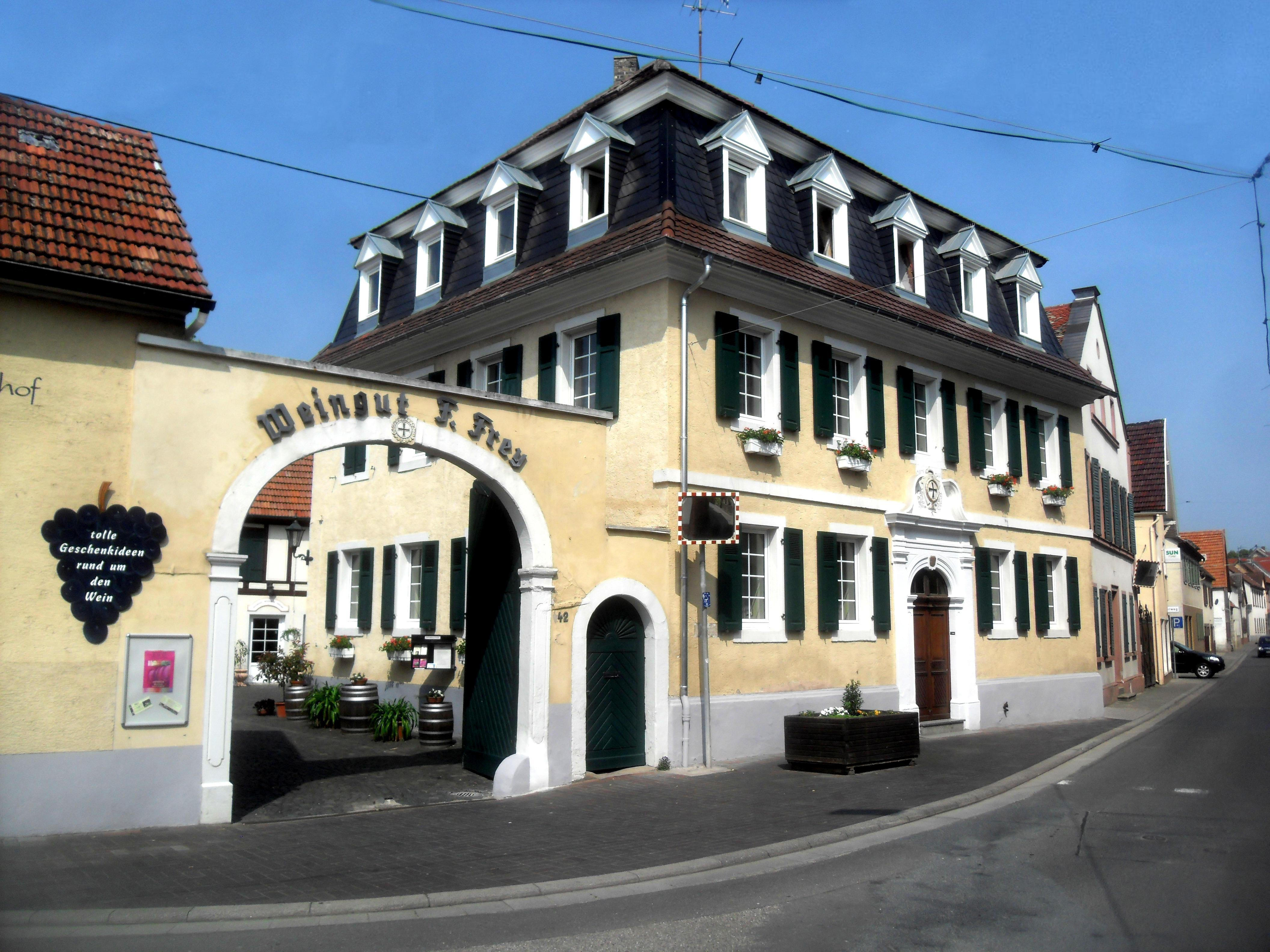 Der Deutschherrenhof (Weingut Frey) in Guntersblum in Rheinhessen (Deutschland) von der Hauptstraße aus